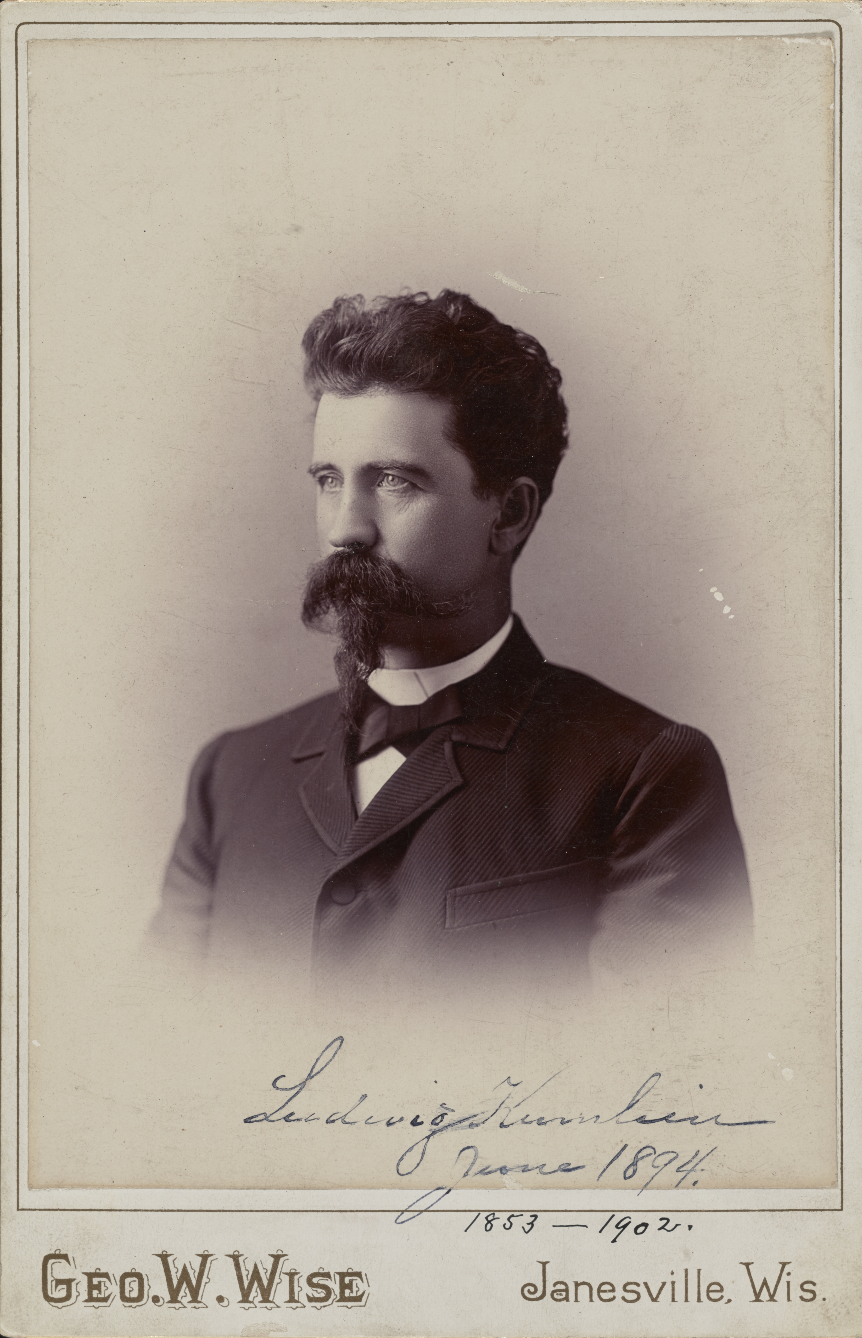 Ludwig Kumlien 1853-1902